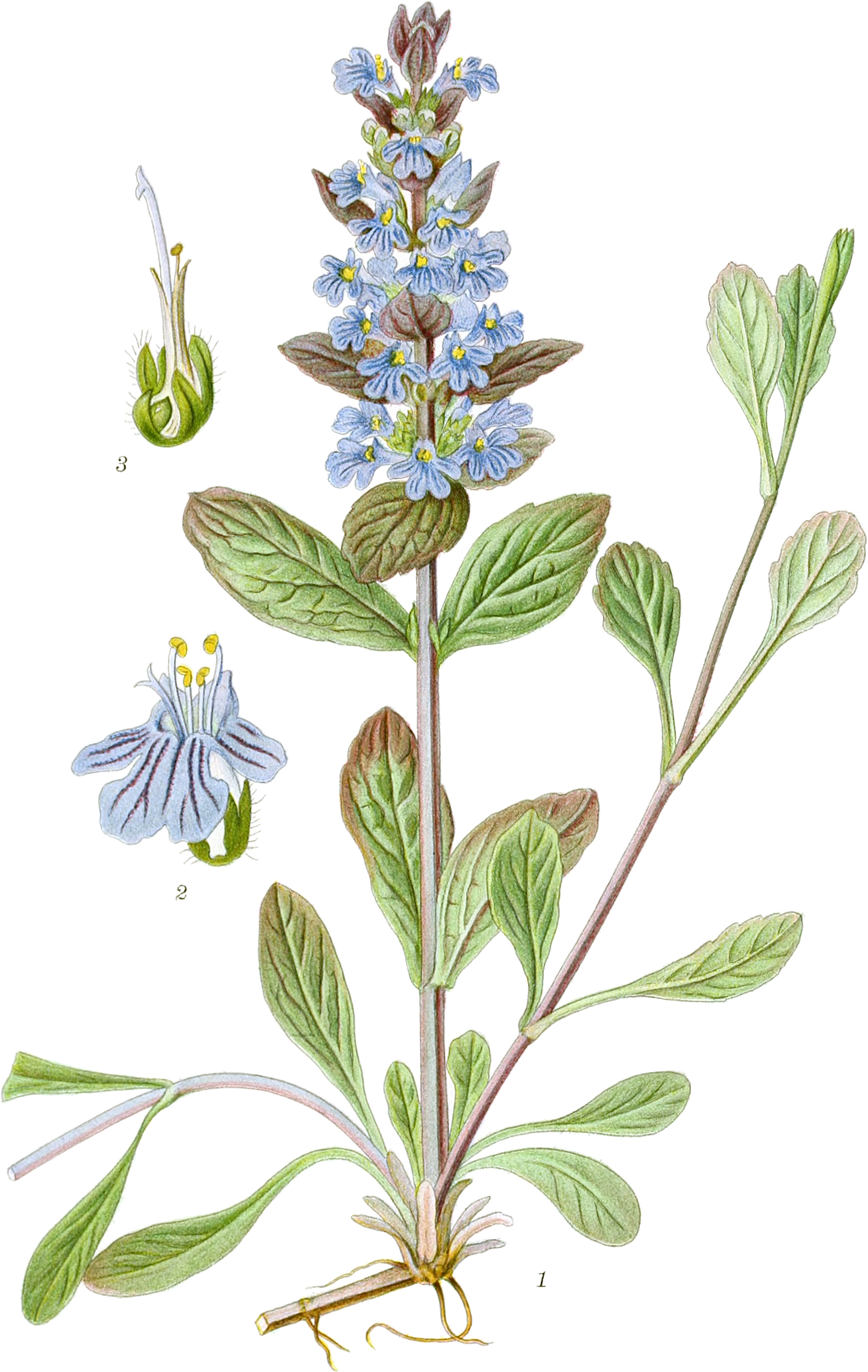 Mentz, A.; Ostenfeld, C. H.: Bilder der Nordflora. Band 4, 1917ff.Kriechender Günsel. Ajuga reptansTaf. 576 Fig. 1. Ein Jahr alte Stück mit zwei jüngeren Ausläufern (einer aus Platzgründen schräg nach oben heraus) und ein blühender Triebe. Fig. 2. Blume (3/1). Fig. 3. Blume (3/1); die Krone wurde entfernt.